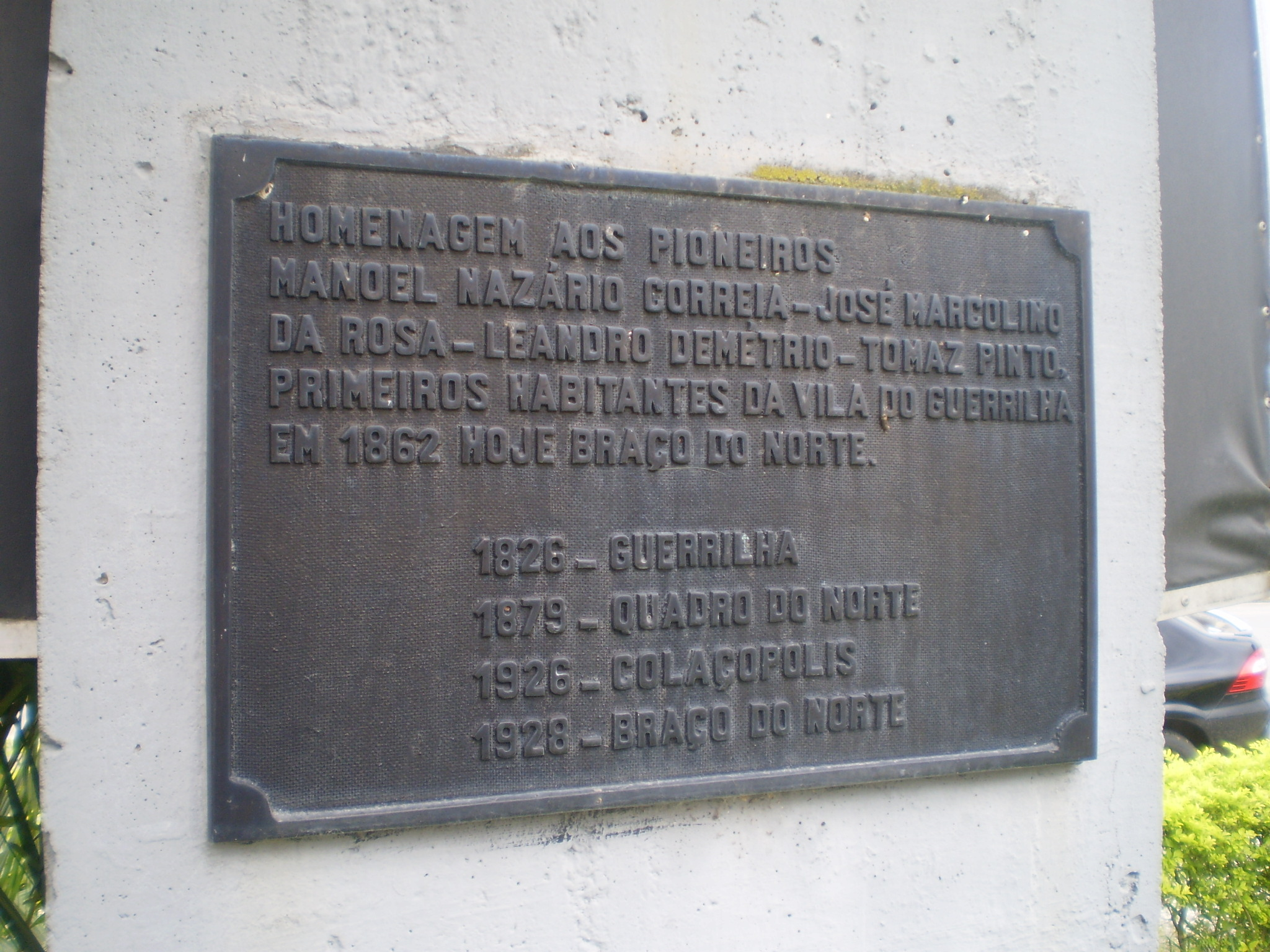 Placa comemorativa do centenário de criação de Braço do Norte